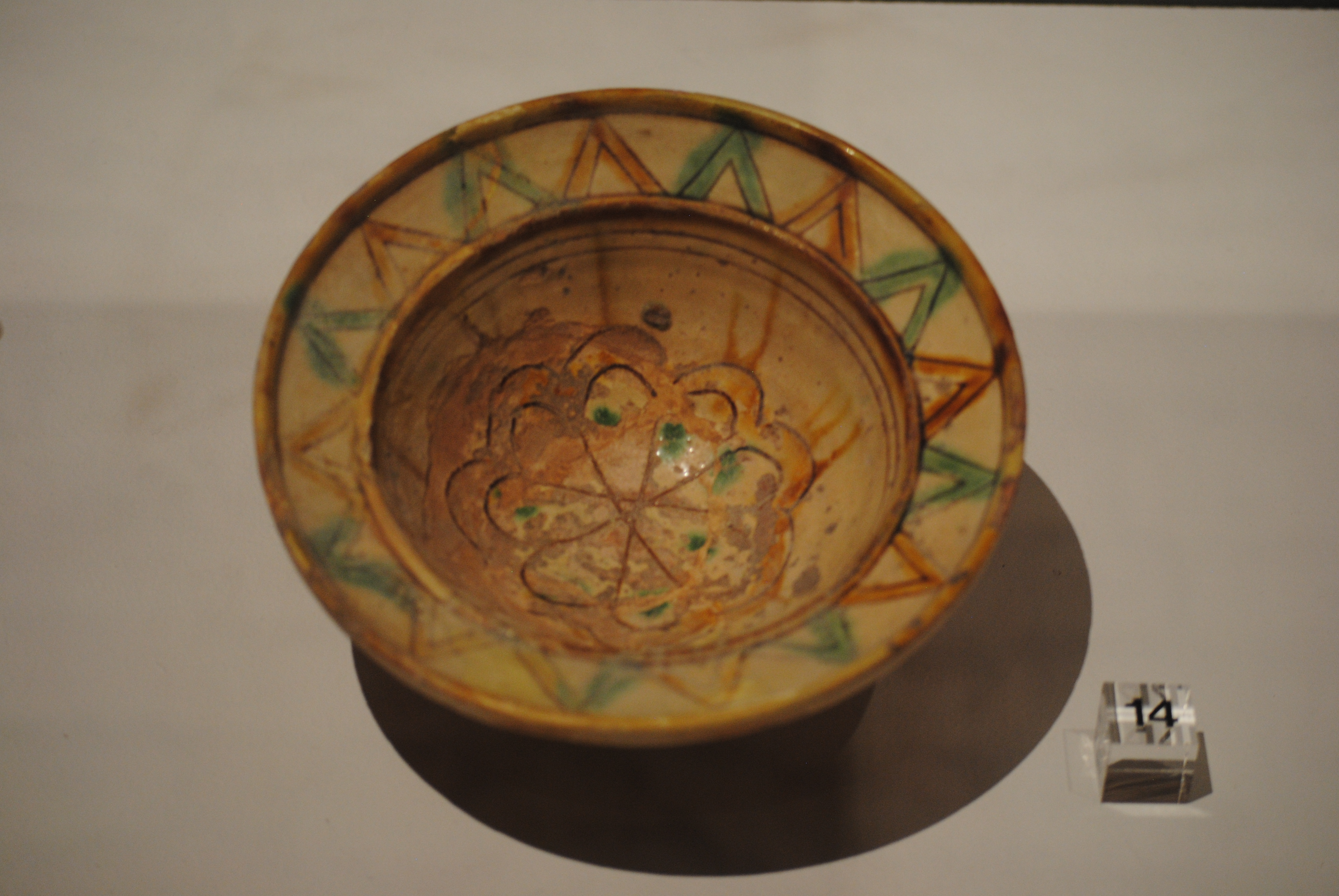 Scodella con tesa - protomaiolica dell'Italia meridionale (Puglia) importata alla fine del XII secolo e usata come bacino ceramico(chiesa si San Paolo all'Orto, Pisa) - Museo nazionale di San Matteo.